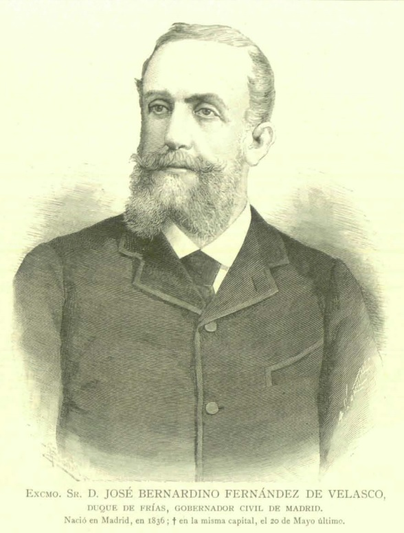 José Bernardino Fernández de Velasco, duque de Frías, gobernador civil de Madrid.